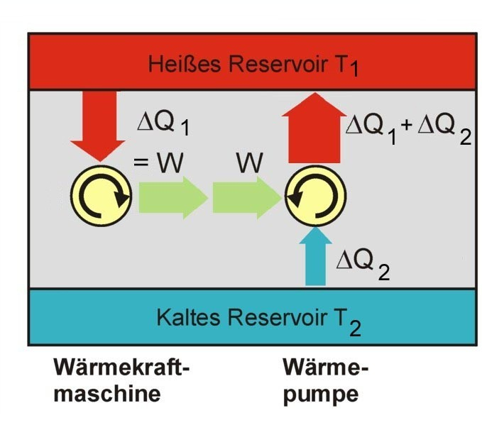 Perpetuum Mobile zweiter Art